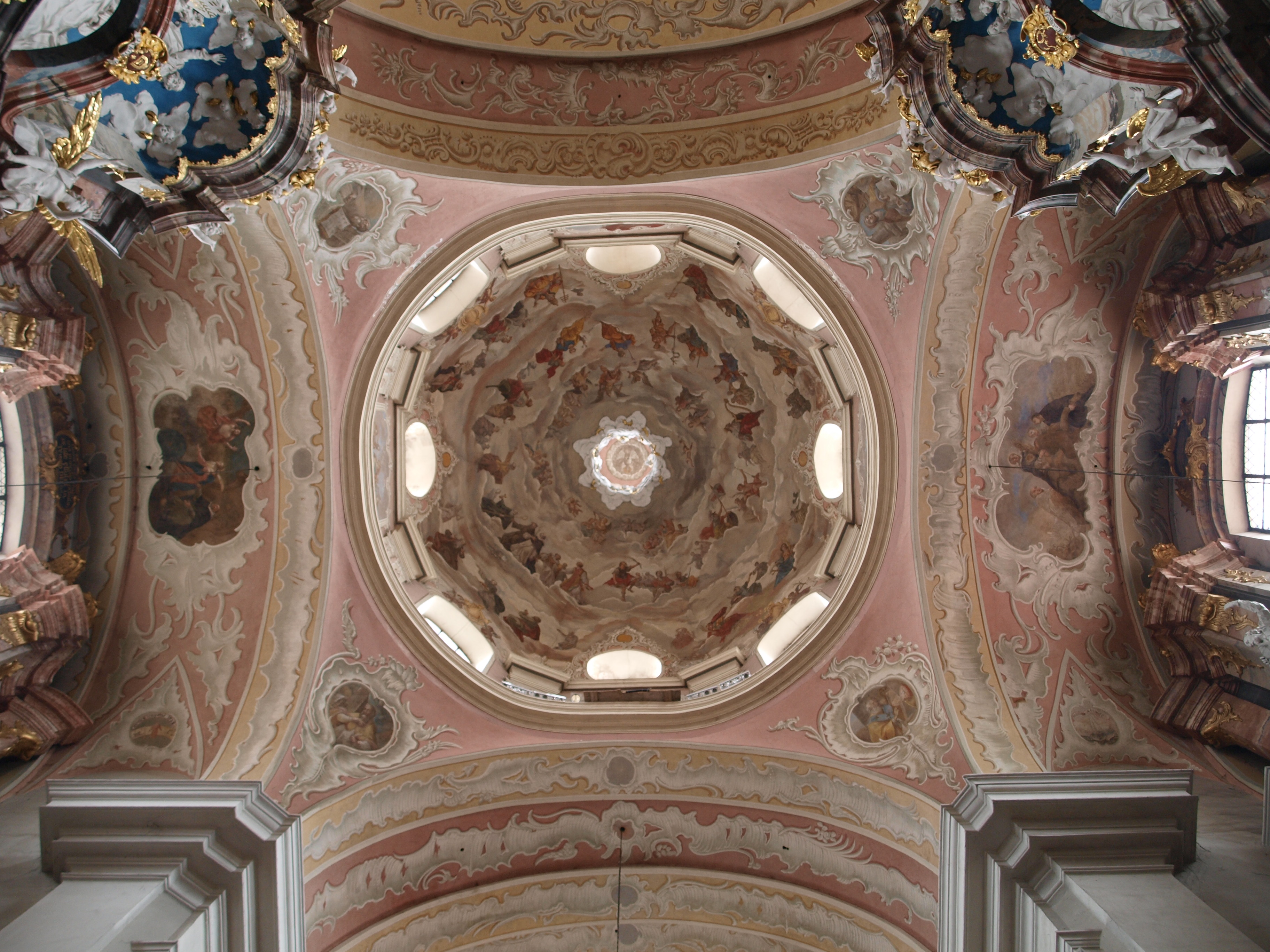 Sklepienie kościoła Ducha Świętego w Wilnie